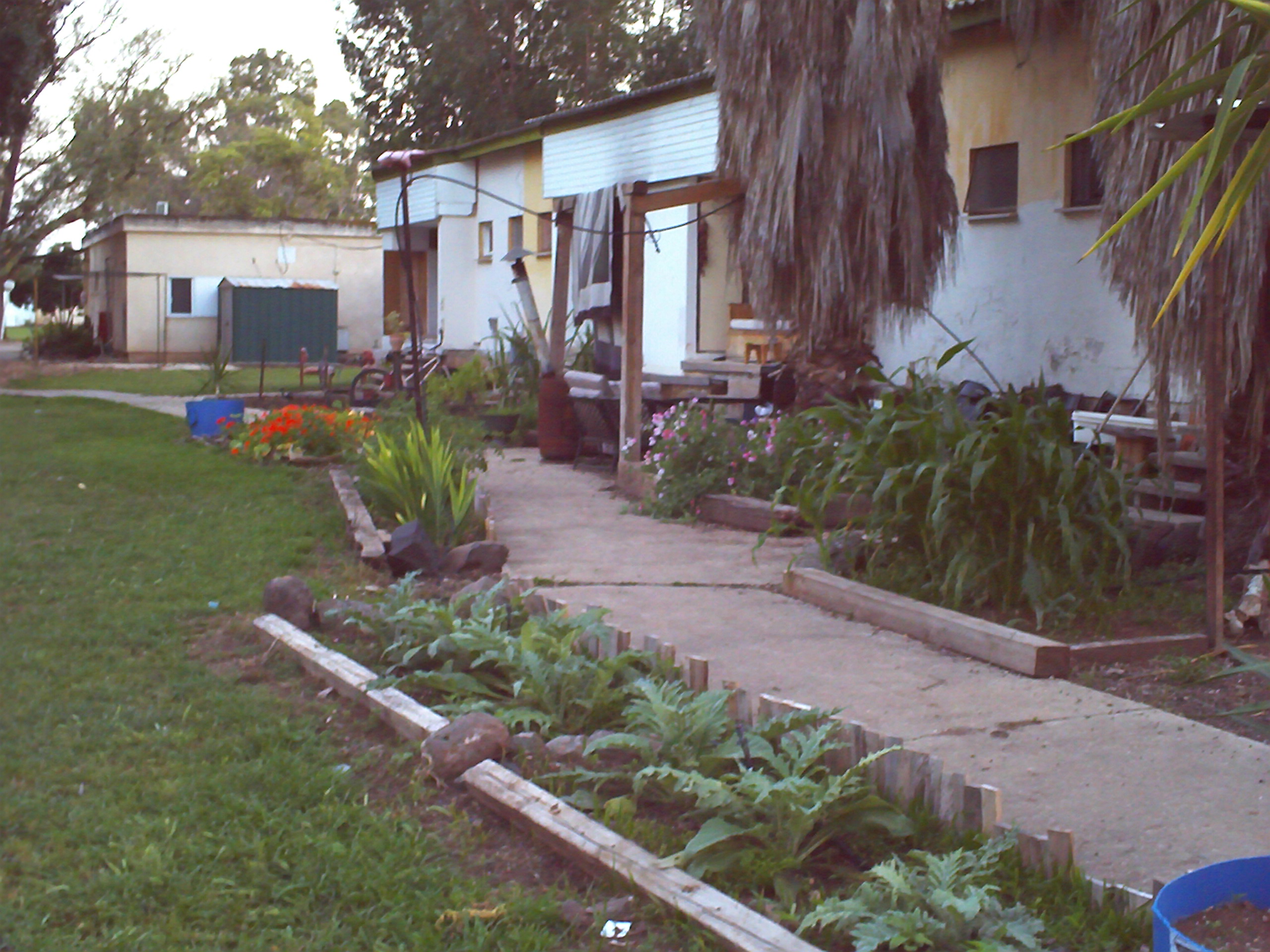 מגורי צעירים בקיבוץ נווה אור